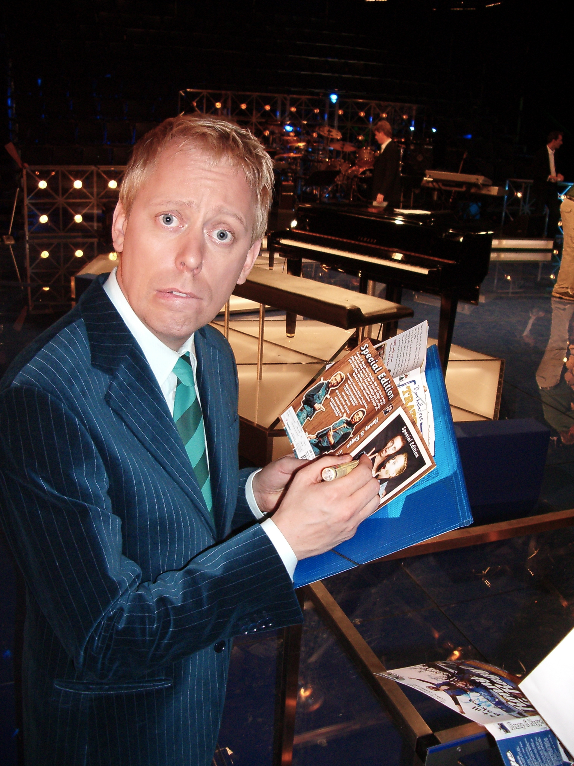 Bild på Peter Settman